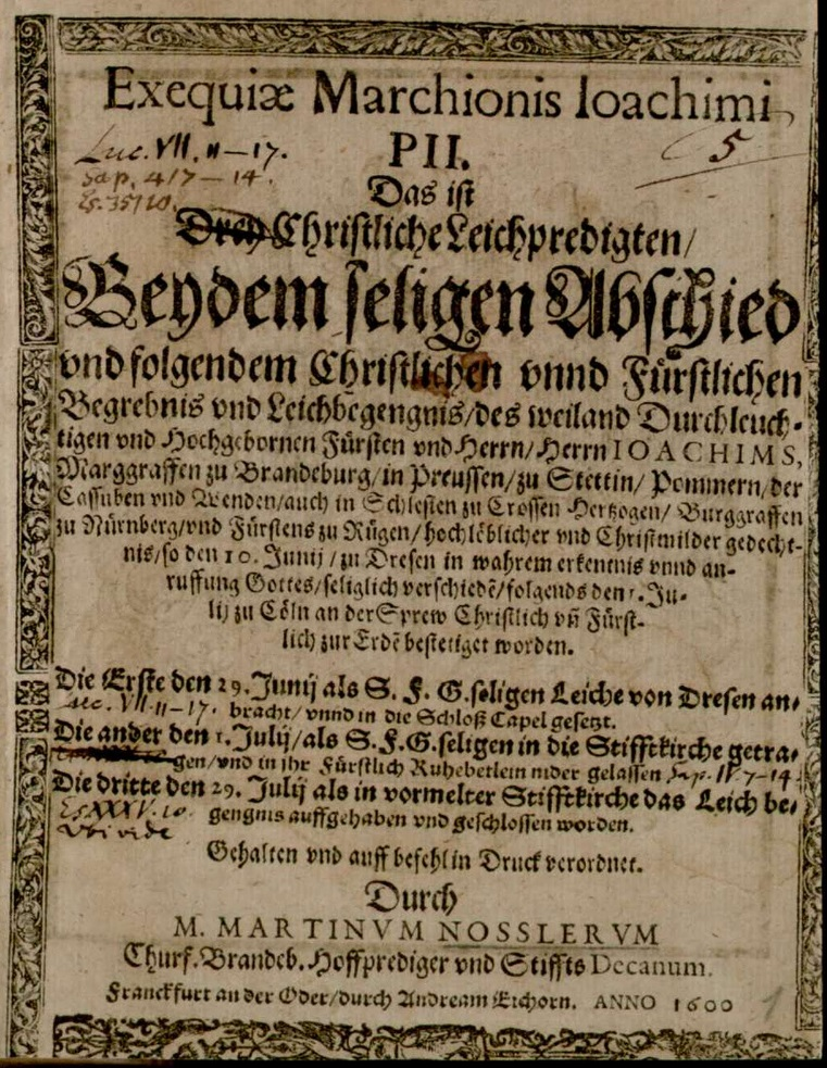 Titelblatt der Druckausgabe der Trauerpredigten des Hofpredigers Martin Nößler auf Joachim von Brandenburg. Die Stifftkirche ist der alte Berliner Dom.